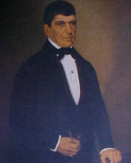 Portrait de Itambe